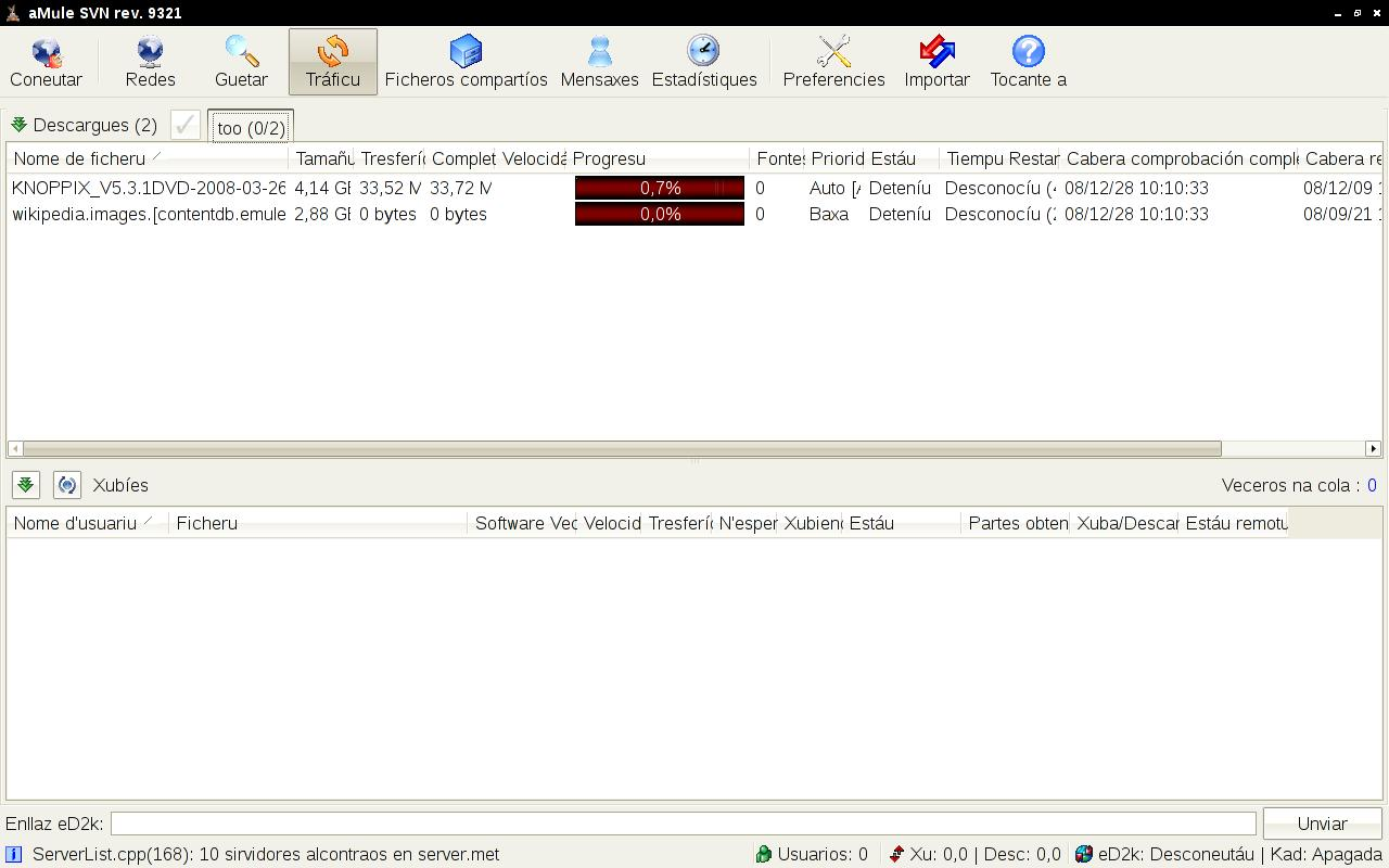 Semeya captura d'aMule n'ast